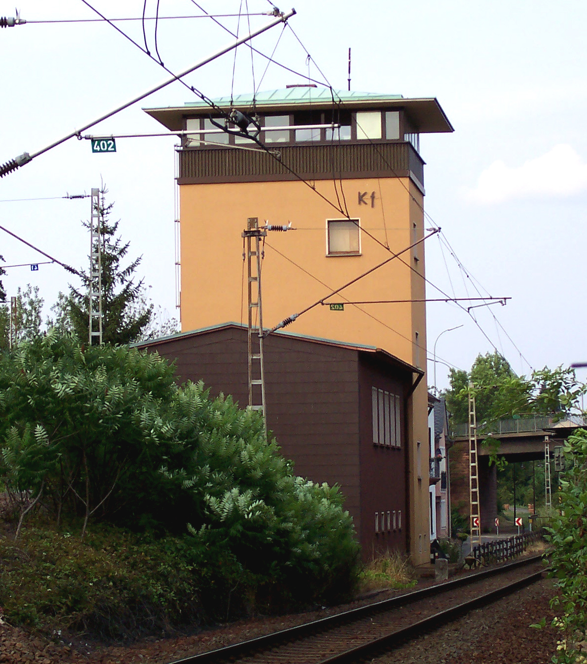 Gleisbildstellwerk mit angebautem Relaisraum